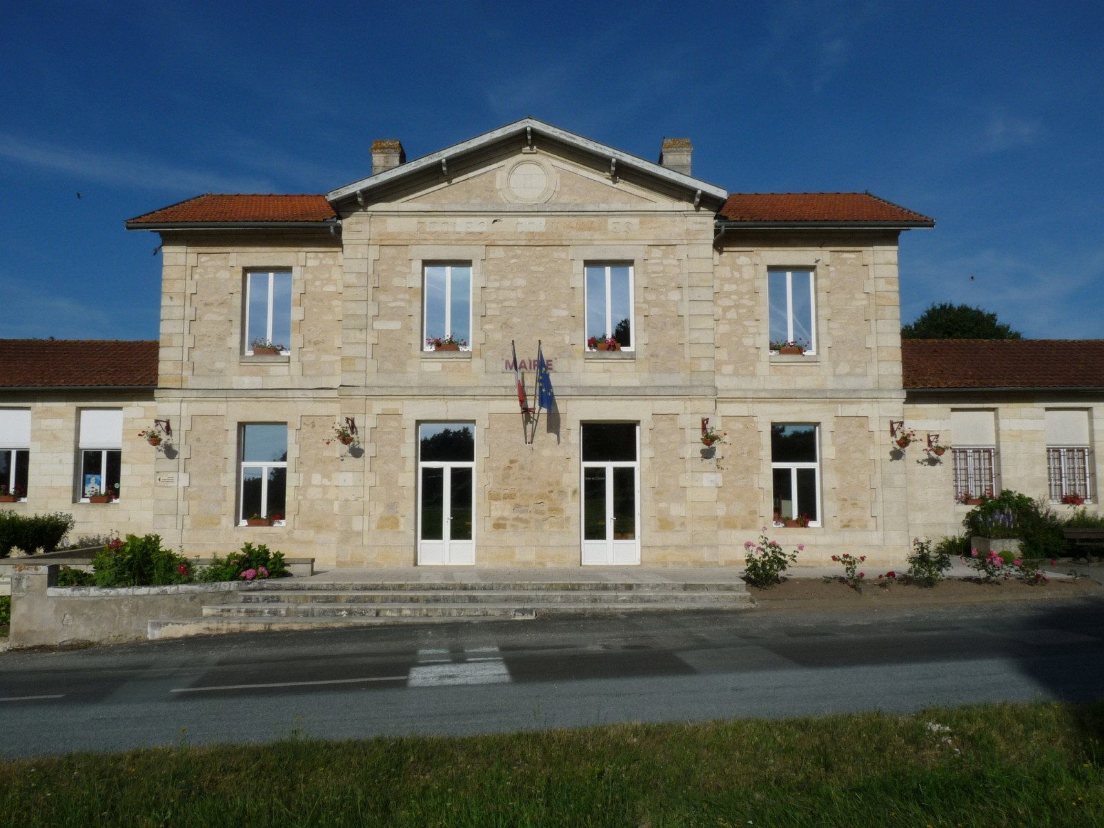 Mairie du Fieu, Gironde, France